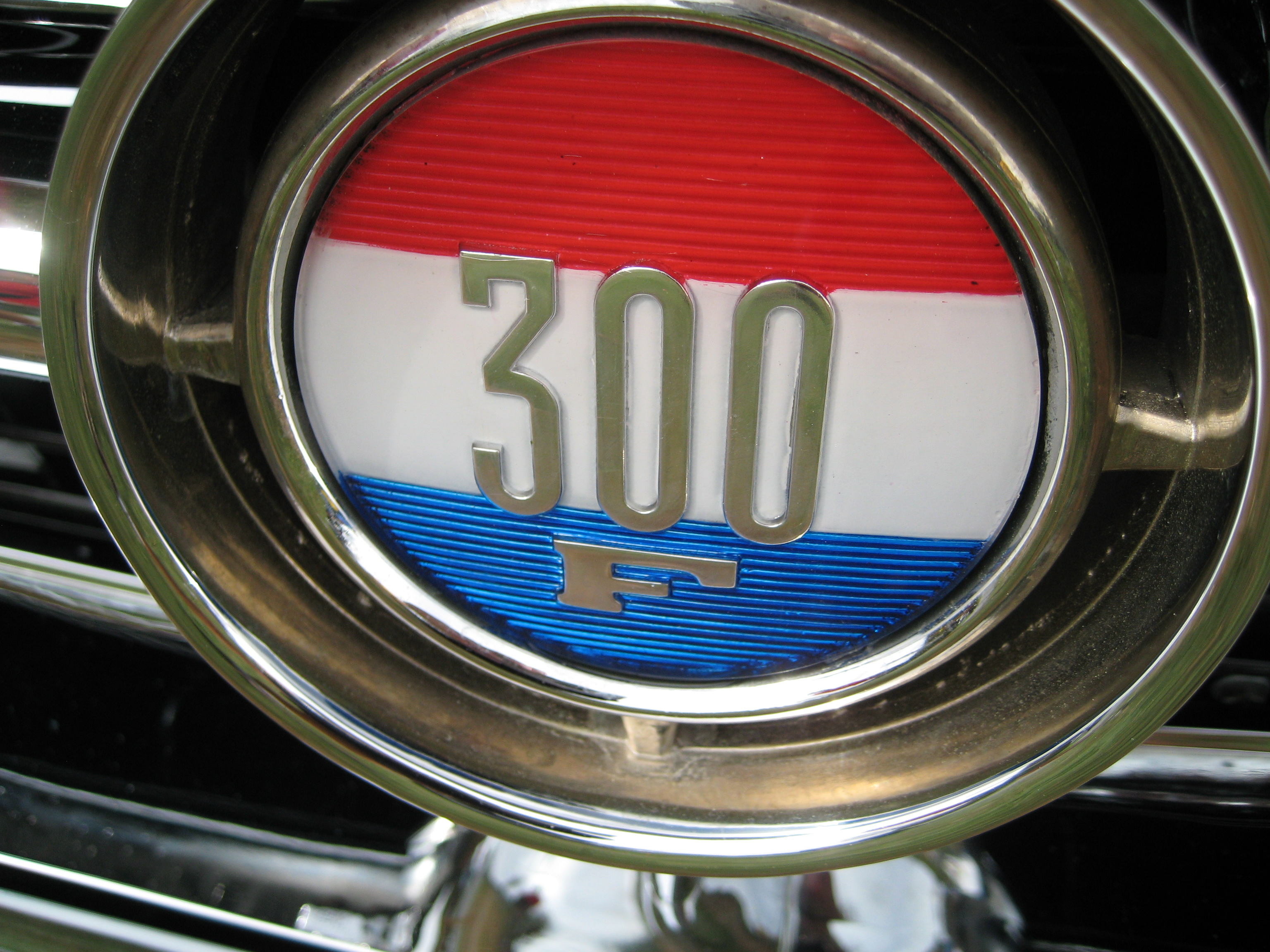 1960 Chrysler 300 F Grille